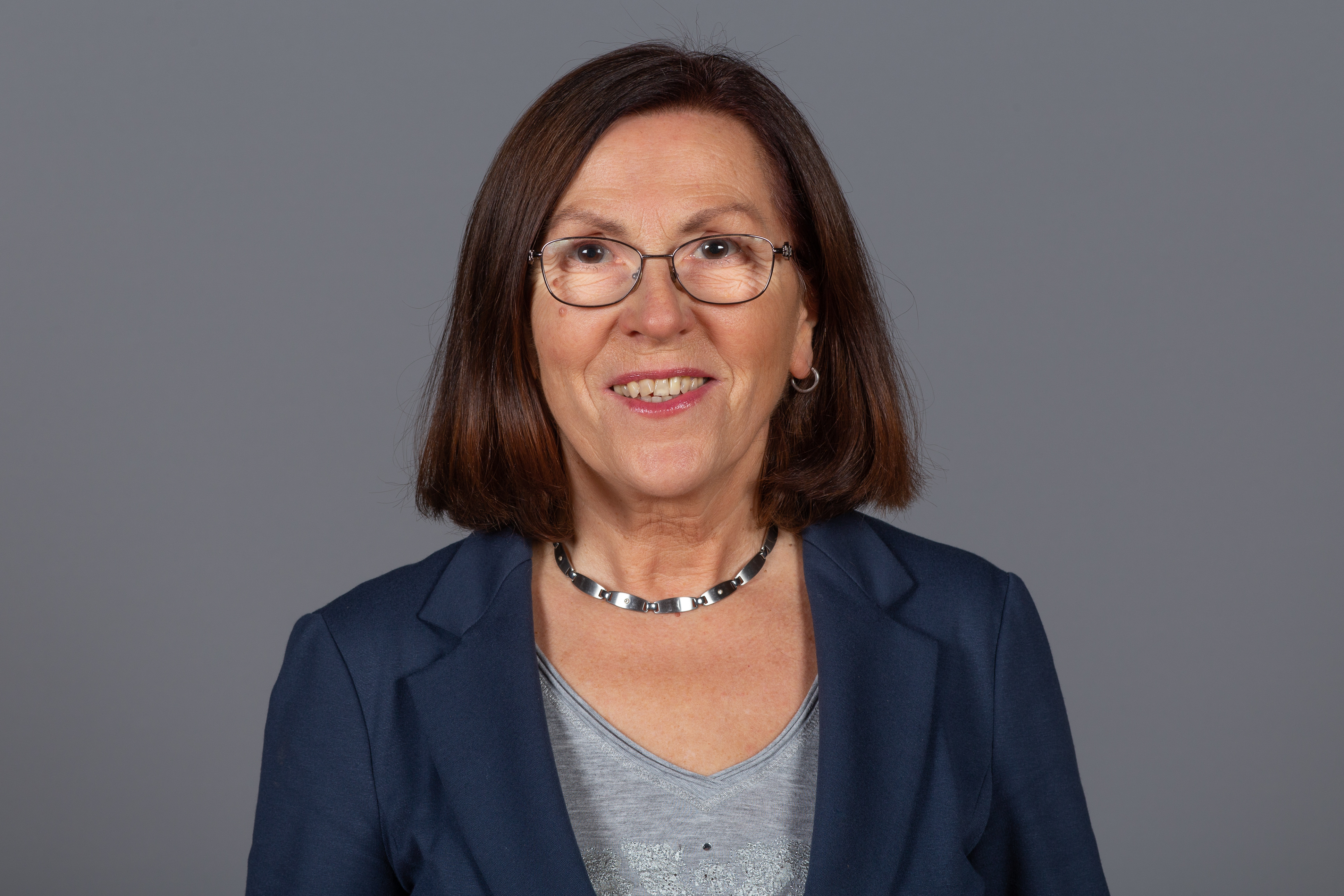 Abgeordnete(r) der Bürgerschaft der Freien und Hansestadt Hamburg Regina-Elisabeth Jäck